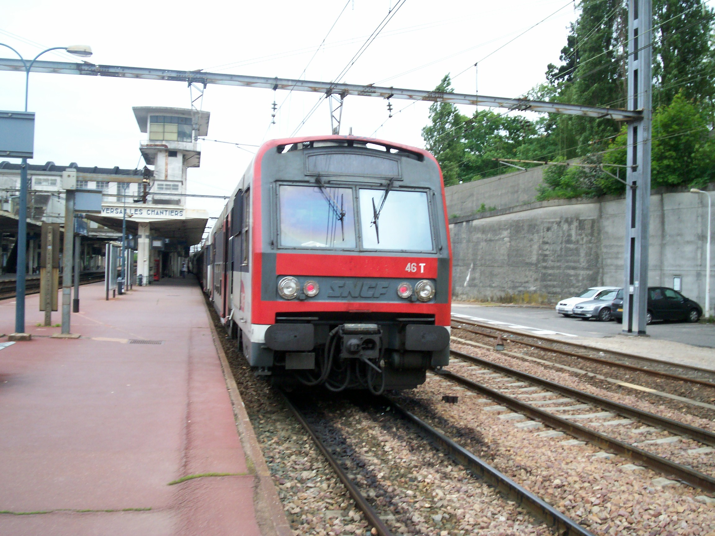 Gare de Versailles-Chantiers